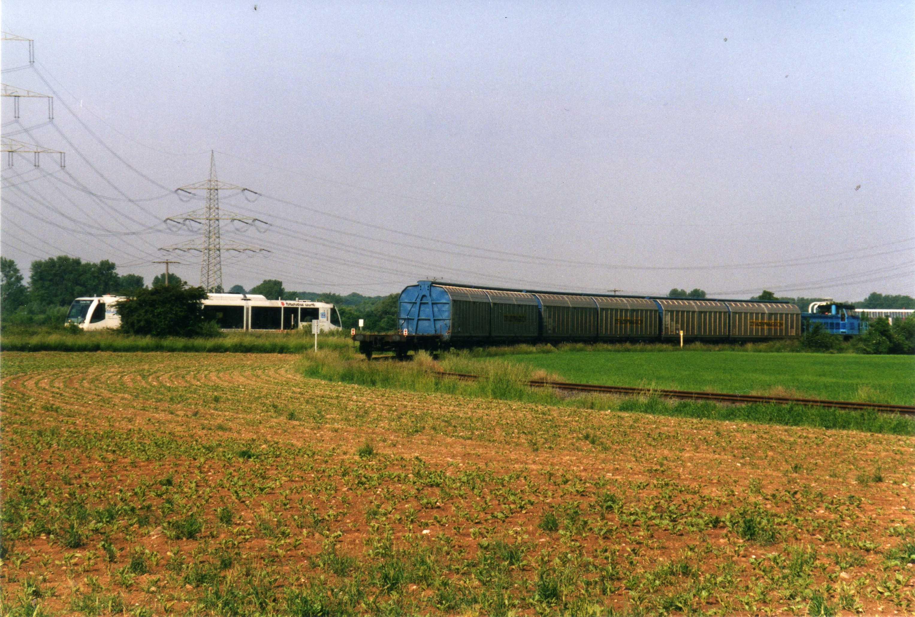 Eine blaue Rurtalbahn-Diesellok wartet mit ihren Wagen auf dem Gleisanschluss des Forschungszentrums Jülich, während auf dem Streckengleis ein RegioSprinter von Jülich (rechts) nach Düren (links) vorbeifährt.